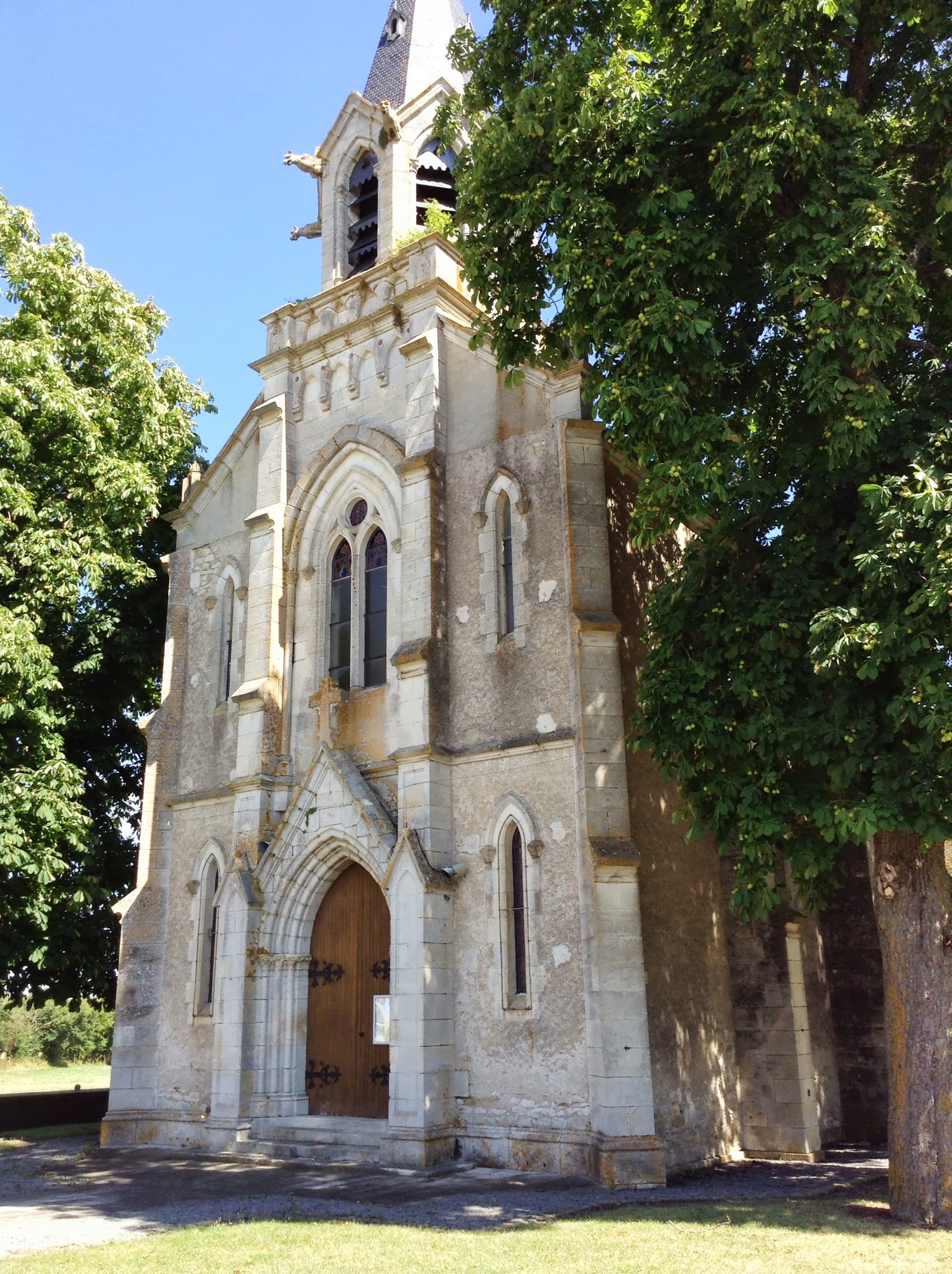 Église de Vallenay (Cher)